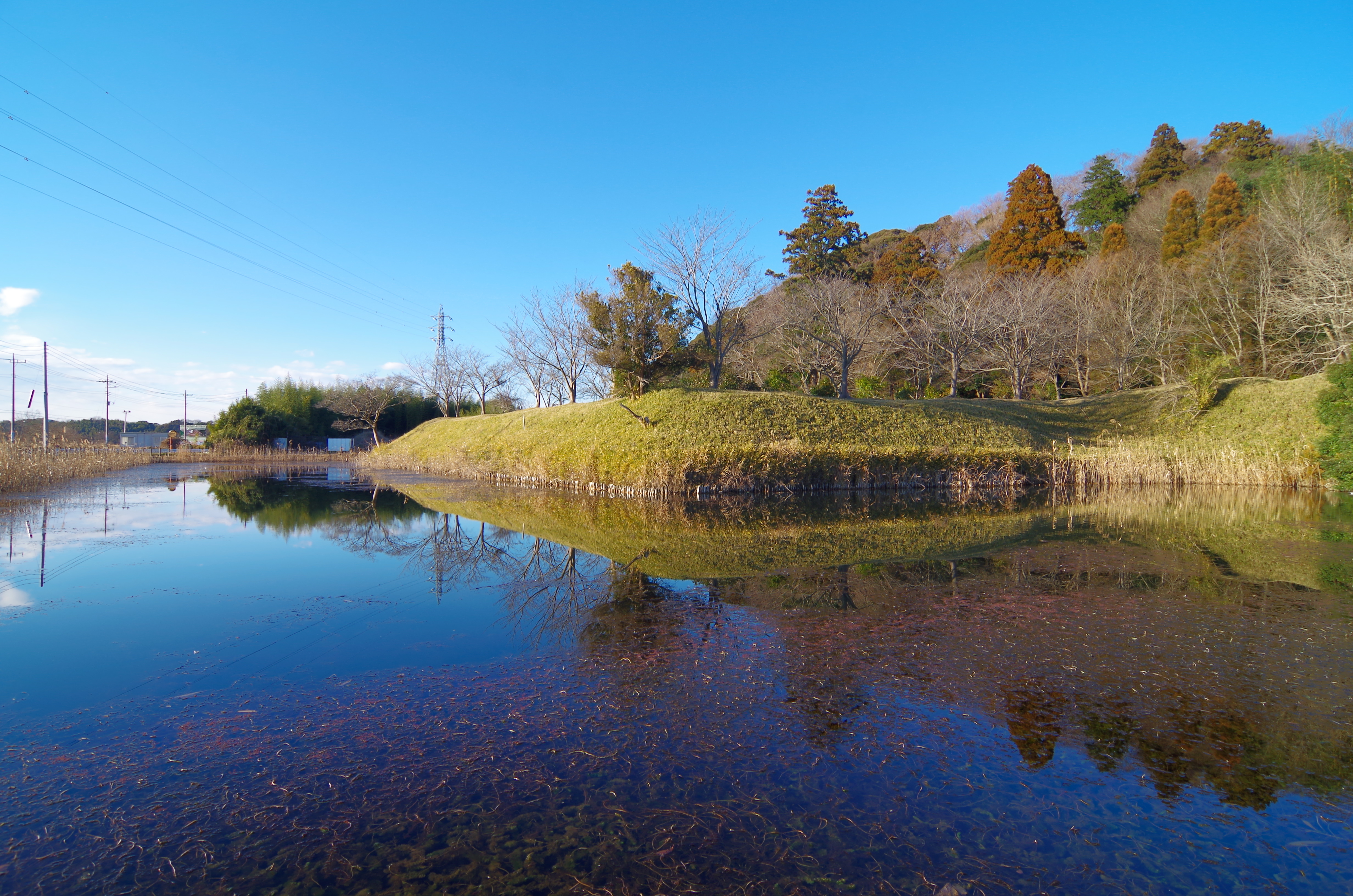 佐倉城址にて 出丸跡 Sakura Castle 2015.1.02